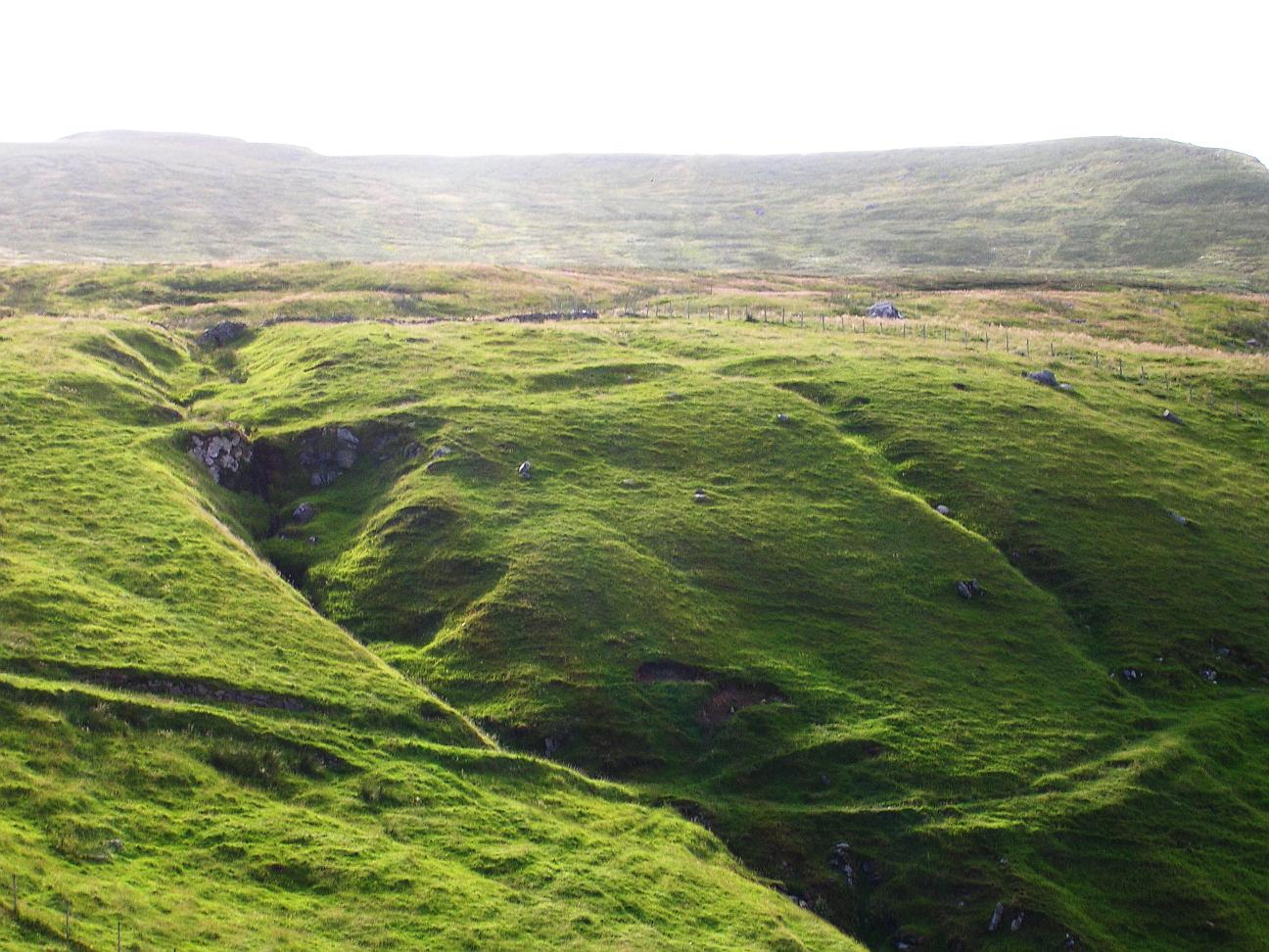 From Runde, Herøy, Møre og Romsdal